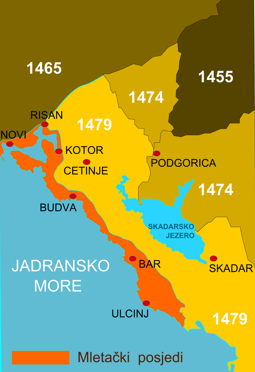 Turski upadi u Crnu Goru u XV vijeku i posjedi Venecije.